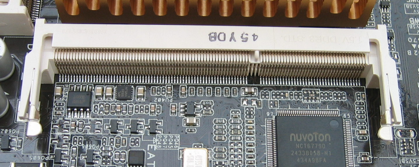 SO-DDR3L Schacht auf ITX Mainboard J1900 SoC